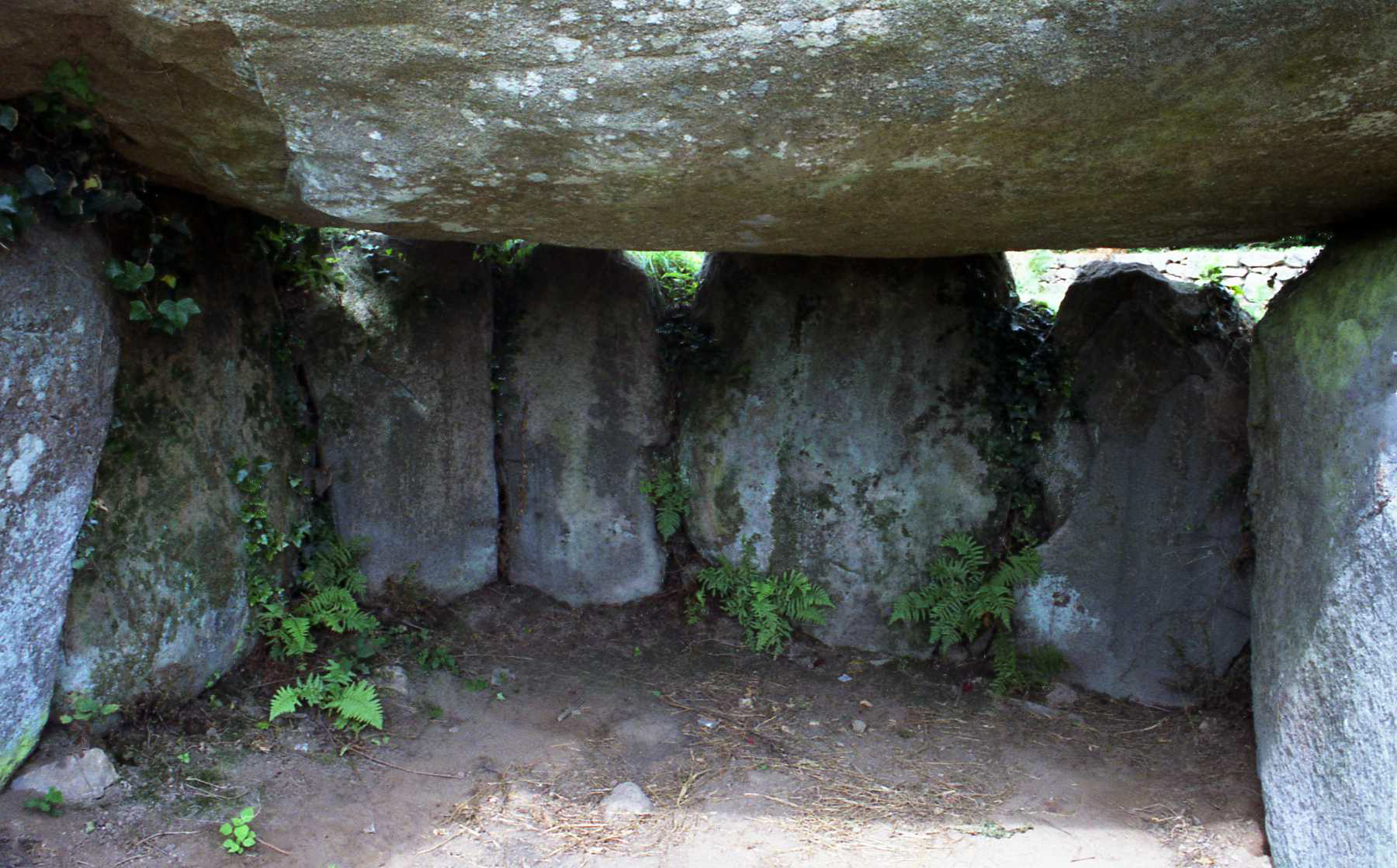 Runesto 1